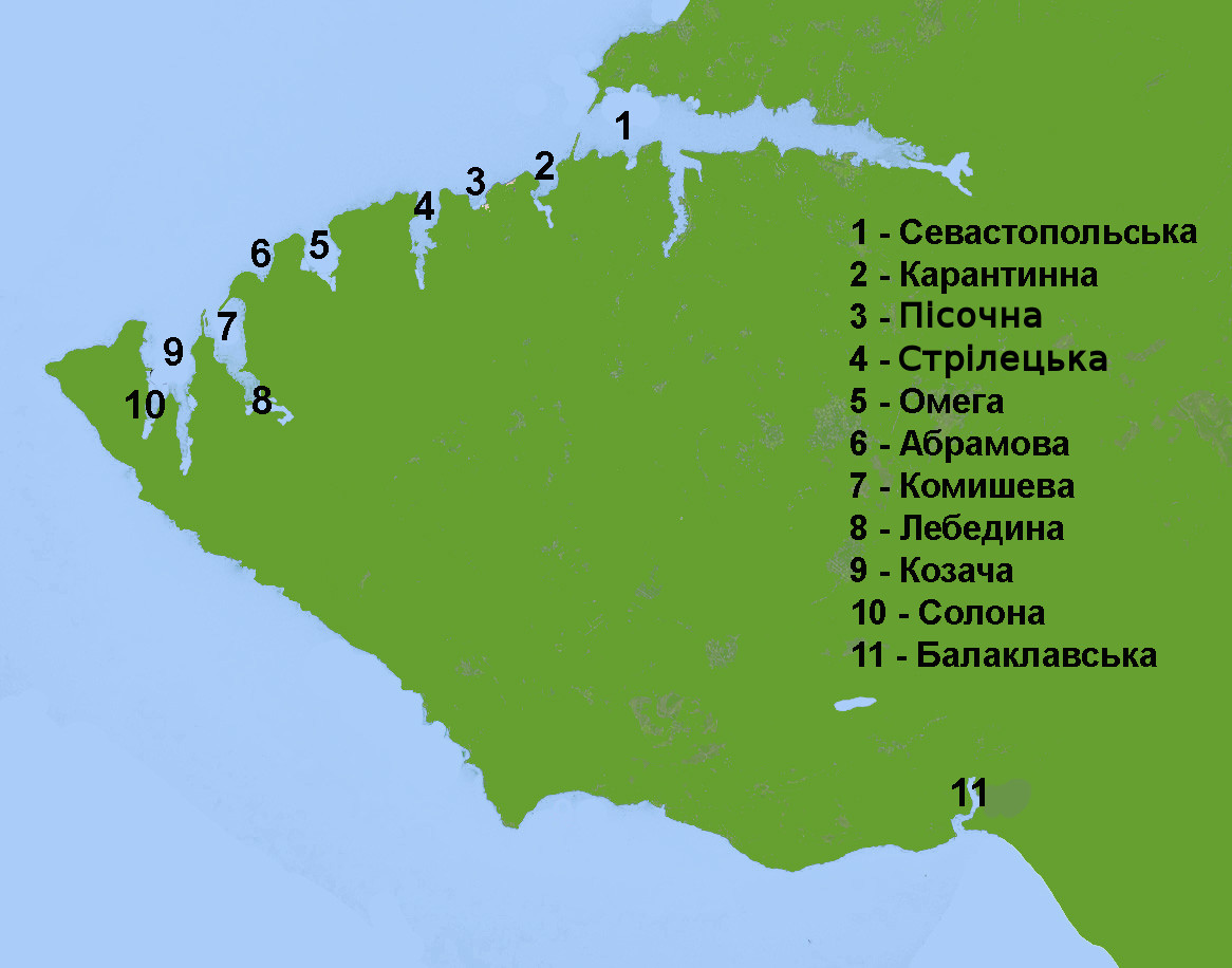 Севастопольські бухти